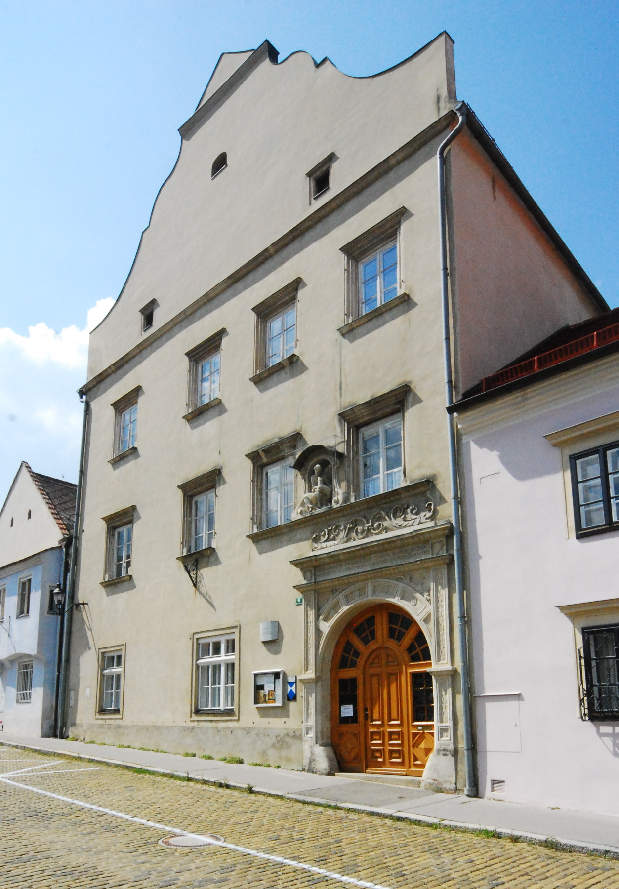 Pfarrhof